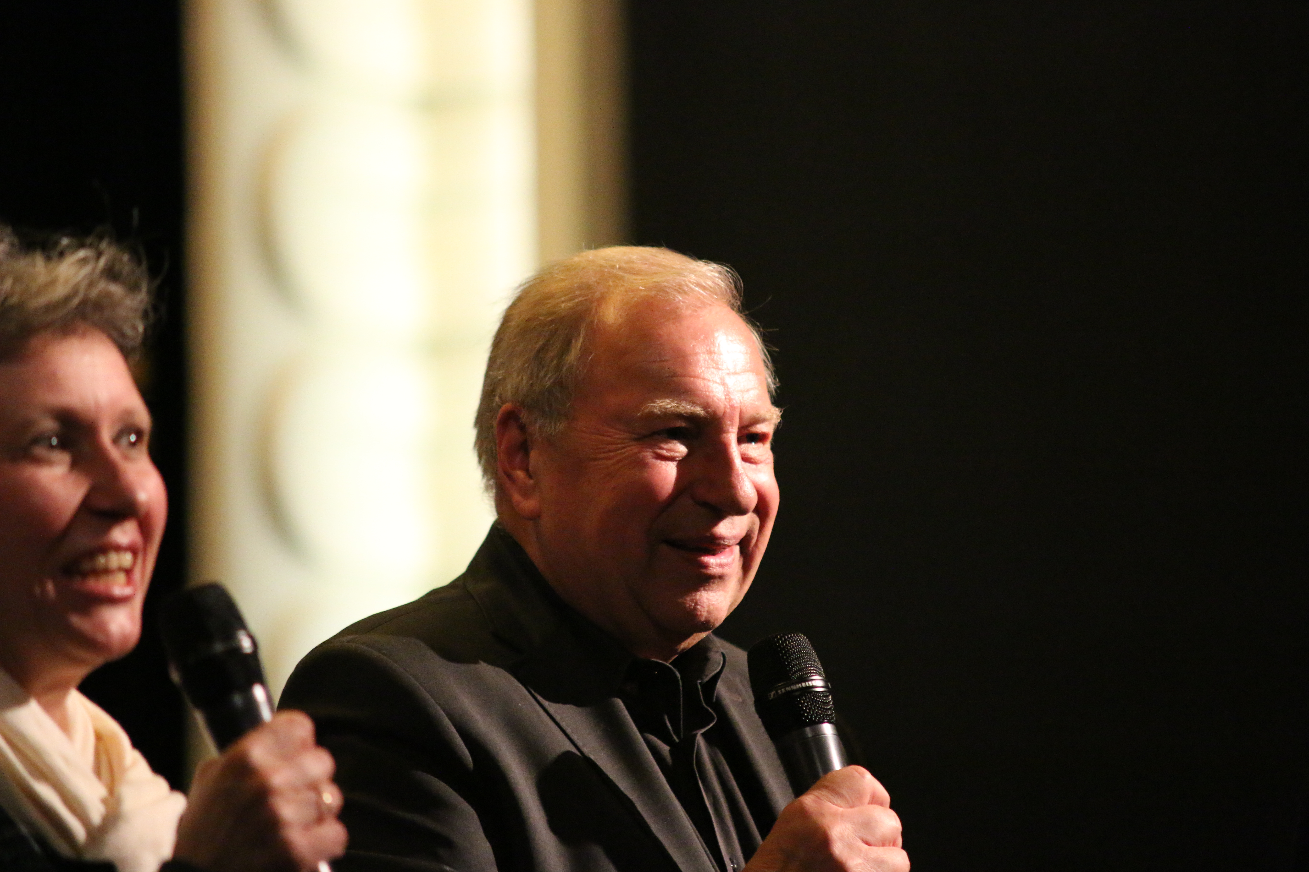 15. GoEast Festival, Wiesbaden 2015: Der polnische Regisseur Jerzy Stuhr sowie eine Dolmetscherin (links). Bei der Deutschlandpremiere des Films "Bürger"